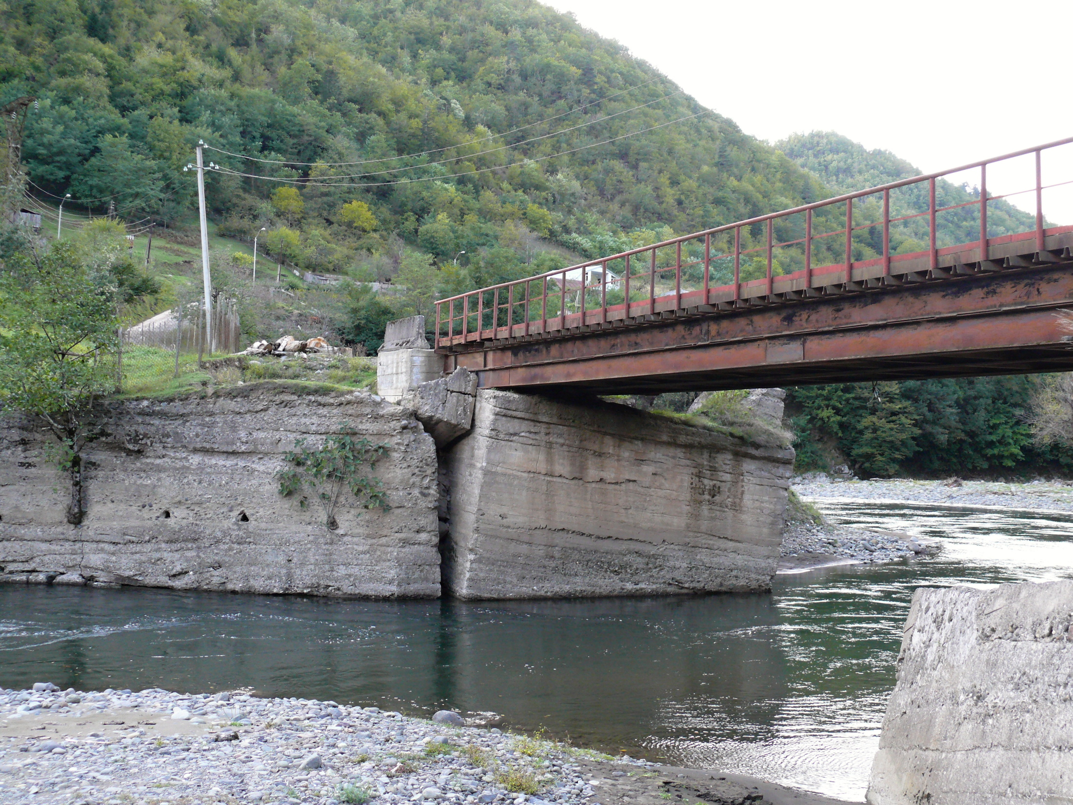 Most se při velké vodě převrátil a byl znovu usazen.